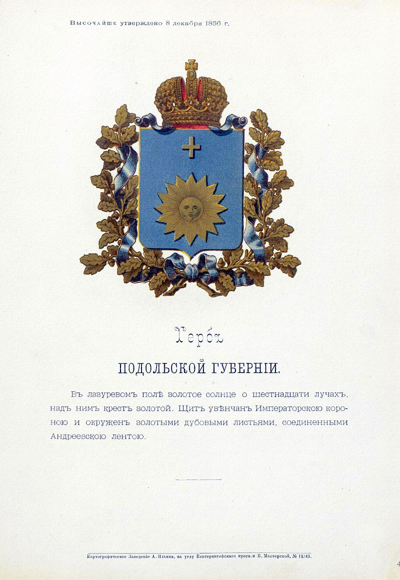 Official Russian Empire coat of arms Podolia Governorate. Герб Российской Империи Подольской губернии с официальным описанием в Гербовнике Бенке. Утверждён Императором Всероссийским Александром Вторым в 1878 году.